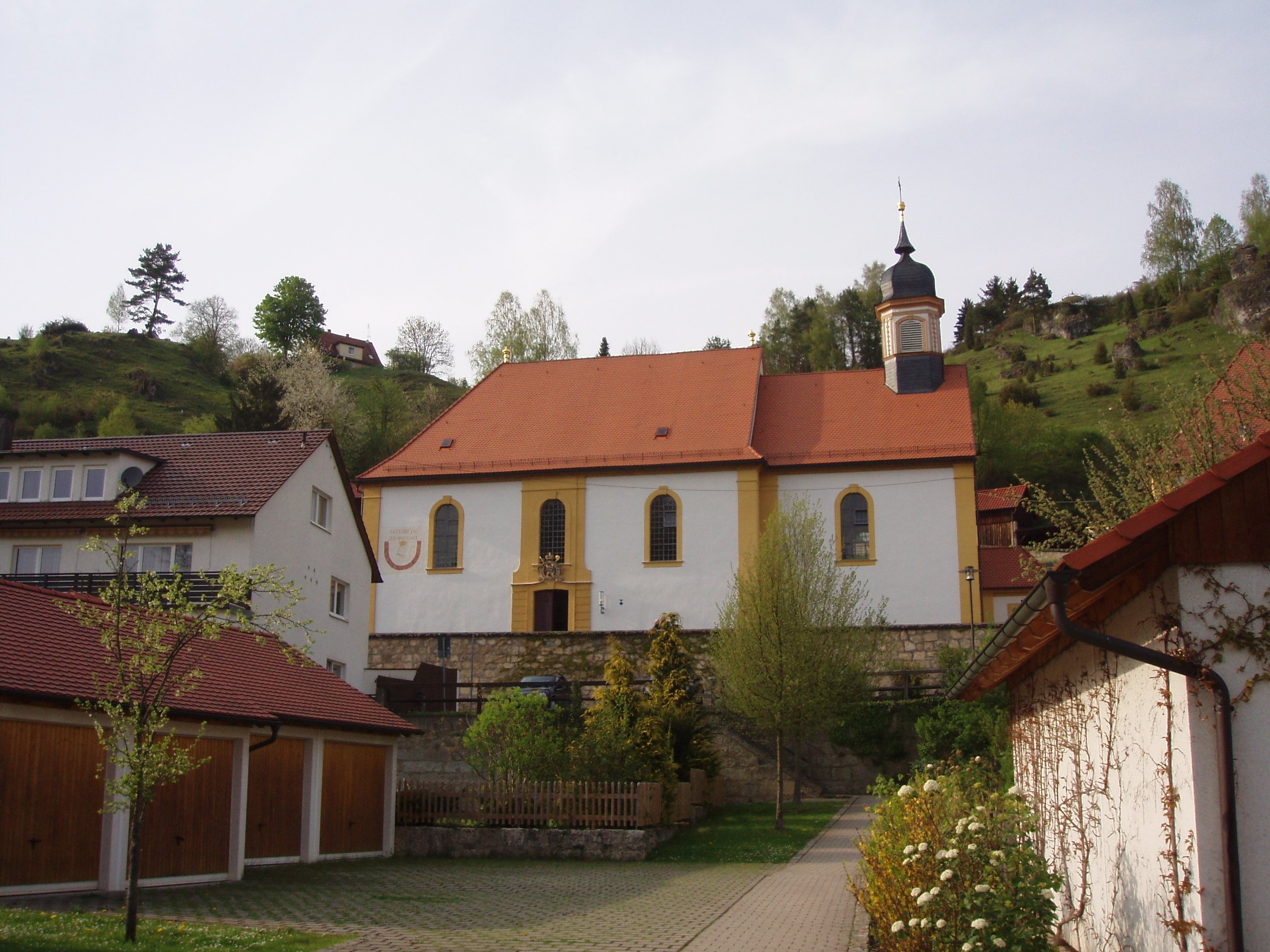 Kunigundenkirche in Pottenstein